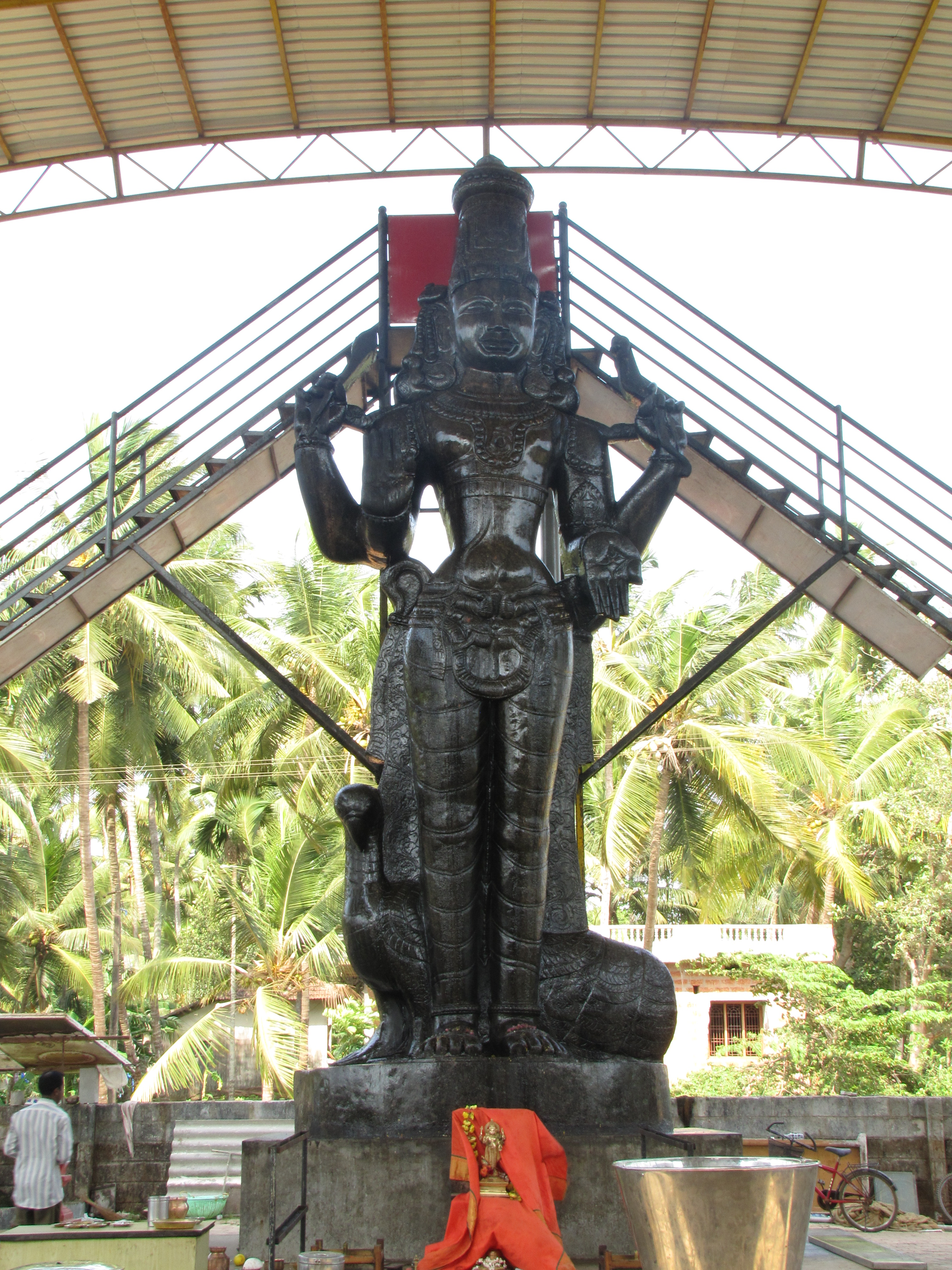 Bennanje Sri Shaneeswara 23 feet Statue Udupi